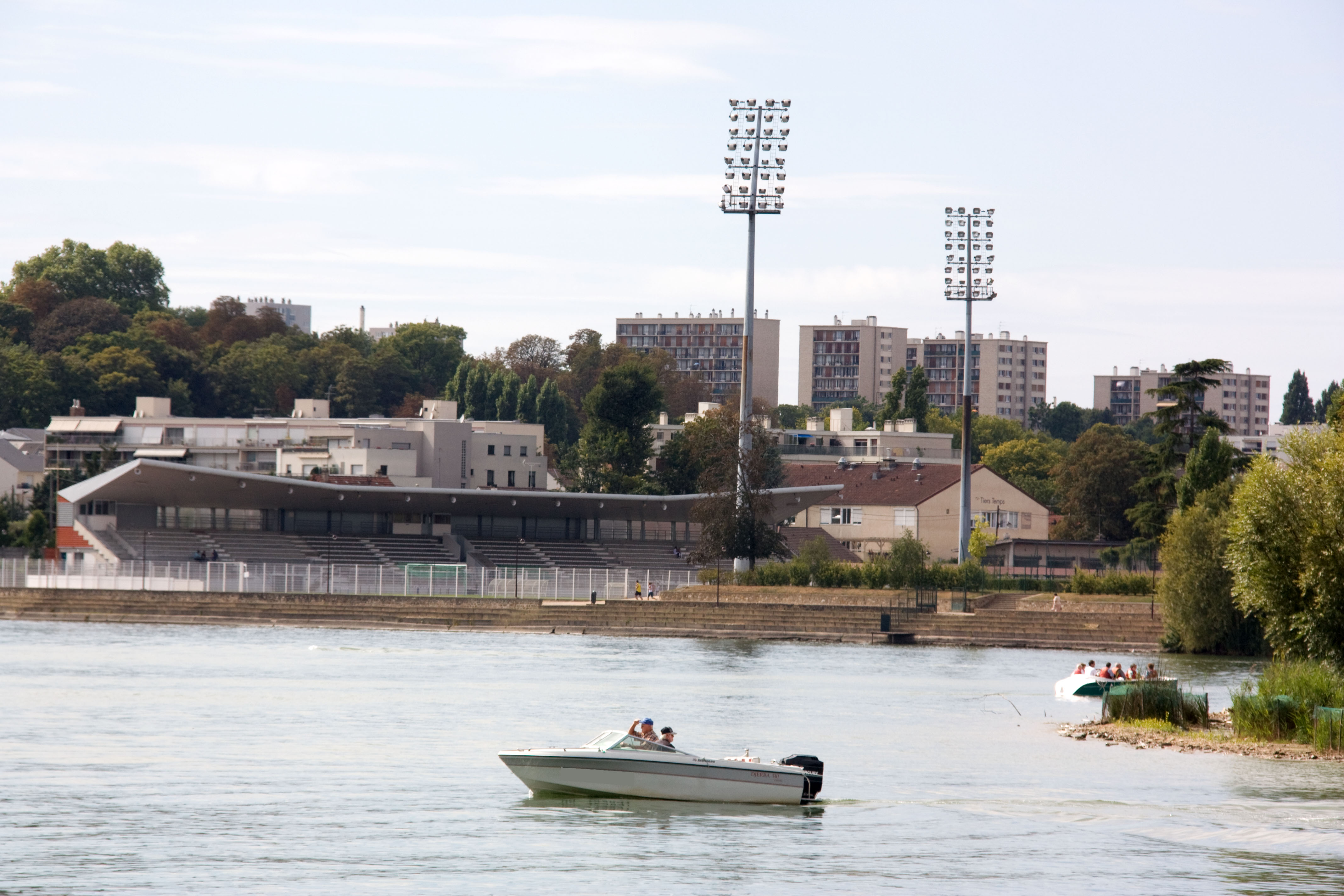 Le lac de Viry-Châtillon, Viry-Chatillon, Essonne, France